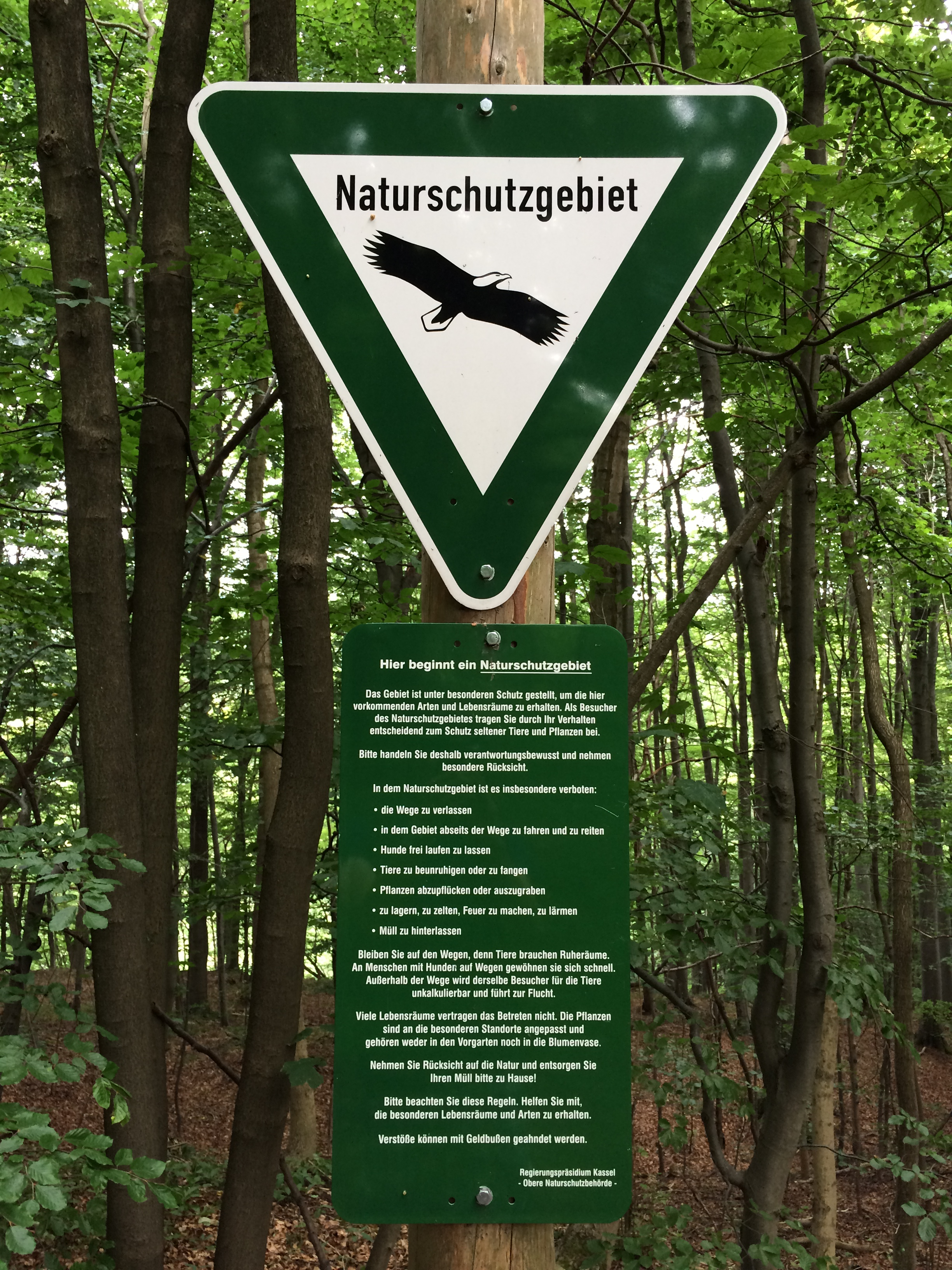 Hinweisschild Naturschutzgebiet "Hessische Schweiz bei Meinhard" am Werra-Burgen-Steig Hessen (X5H), aufgestellt vom Regierungspräsidium Kassel - Obere Naturschutzbehörde